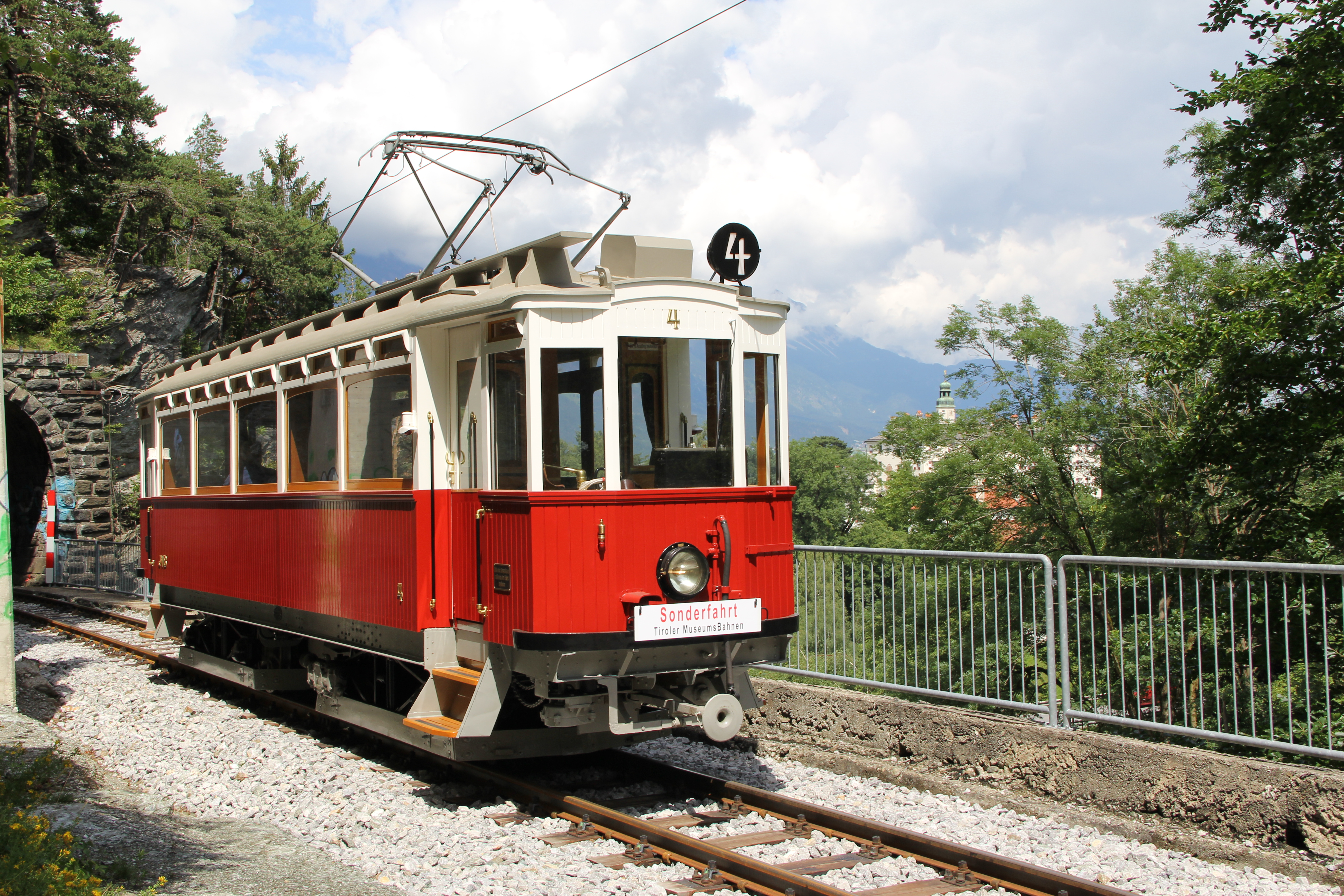 Triebwagen 4 der Lokalbahn Innsbruck–Hall in Tirol, von den Tiroler MuseumsBahnen im Stil der 1940er Jahre rekonstruiert